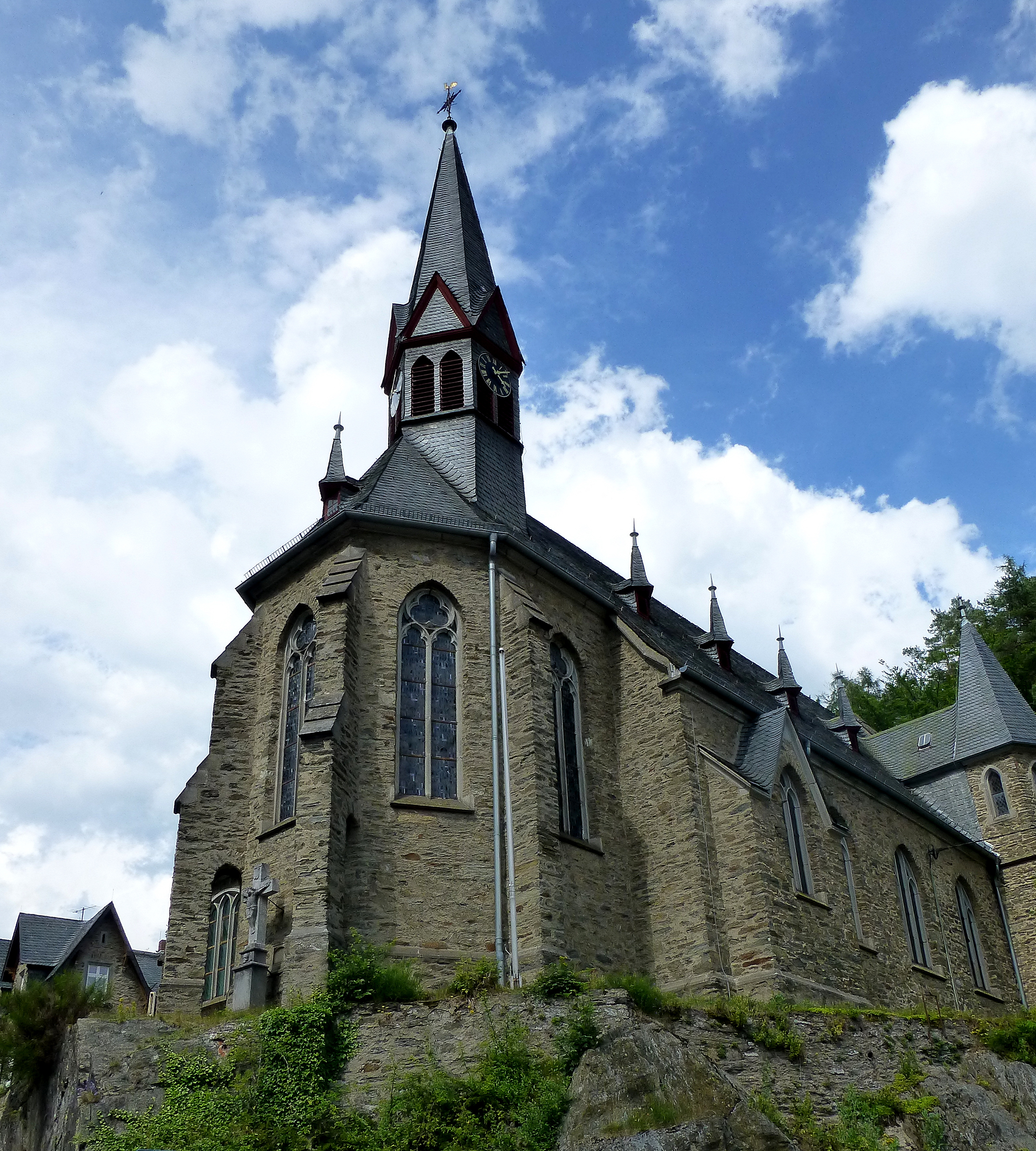 Schmitten - Kath. Kirche St. Karl Borromäus